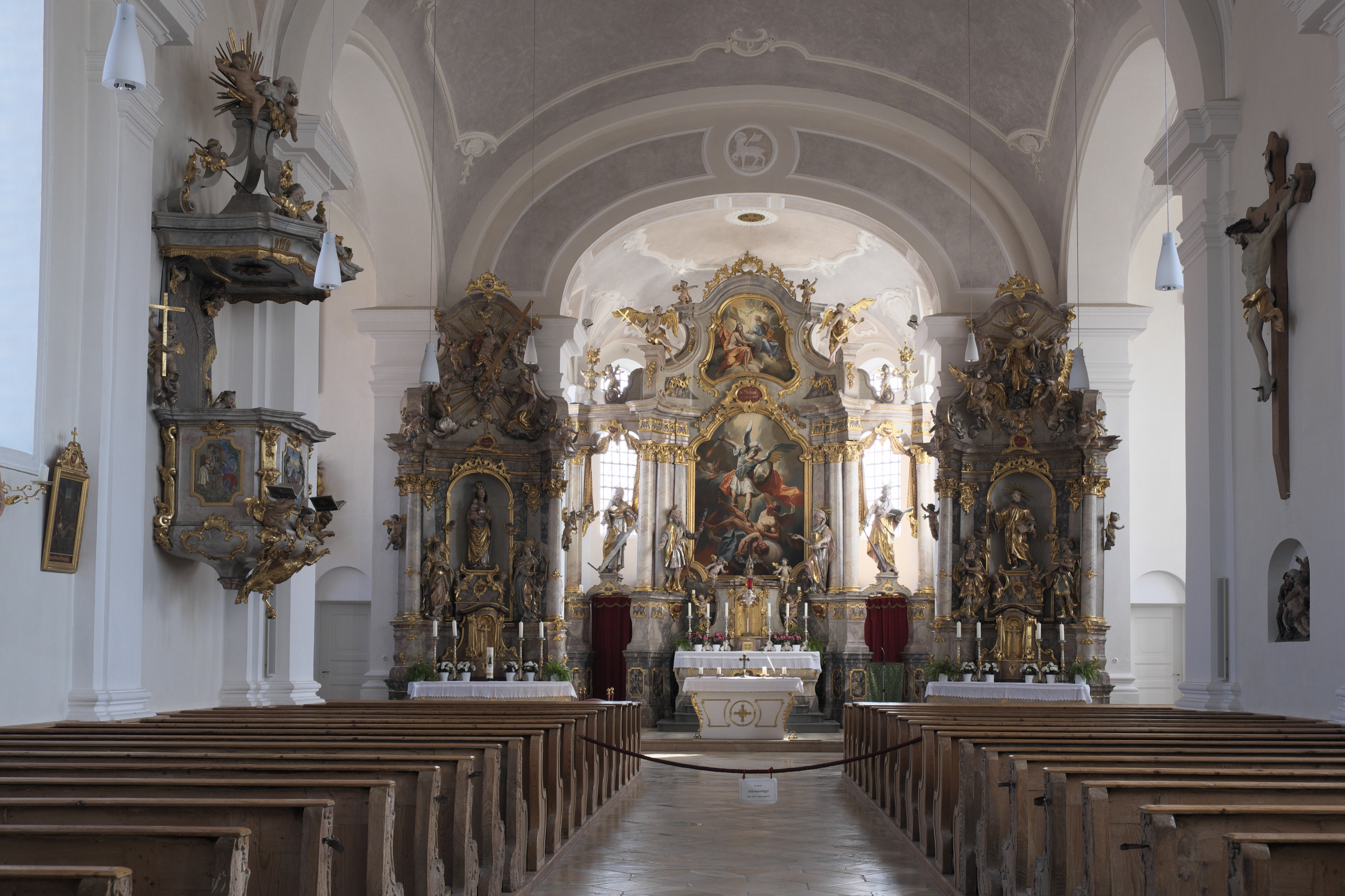 Katholische Pfarrkirche St. Michael in Reichenkirchen (Fraunberg) im Landkreis Erding (Bayern/Deutschland), Innenraum